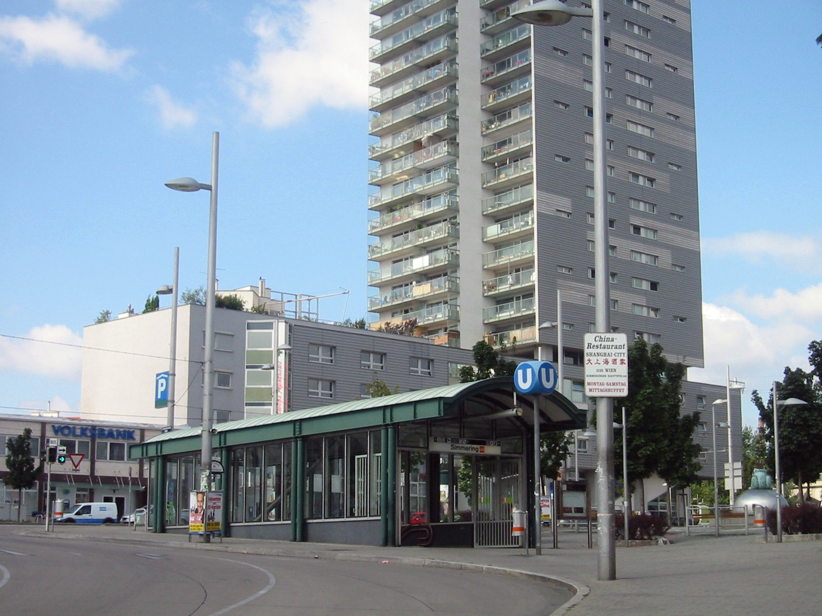 Wien, U-Bahn-Station Simmering